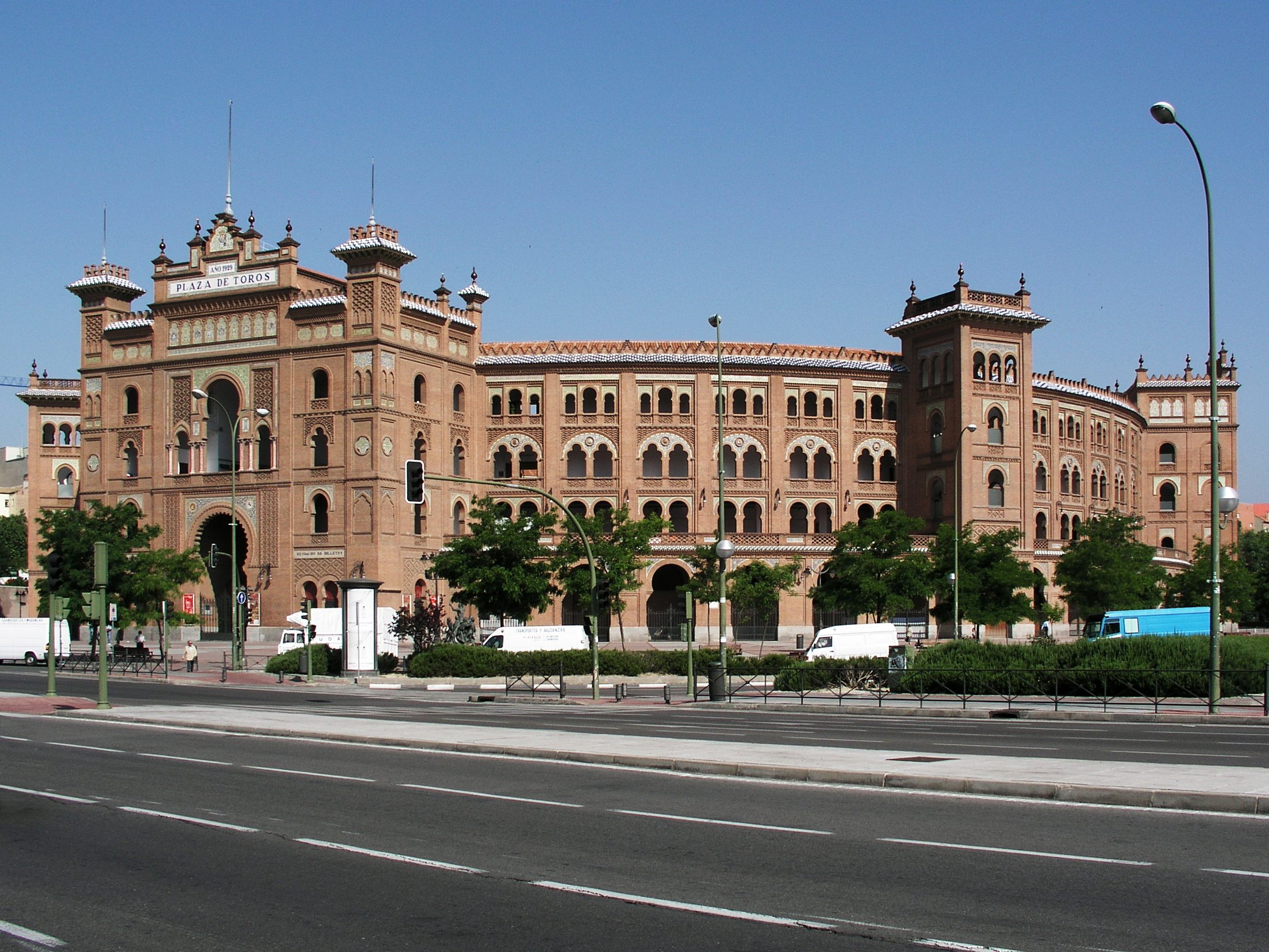 Las Ventas, Madrid, Spain. General view.